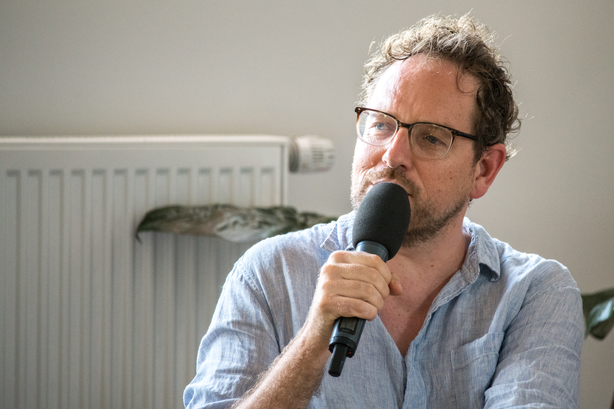 Mats Staub beim 'Festival der Regionen 2019' in Perg